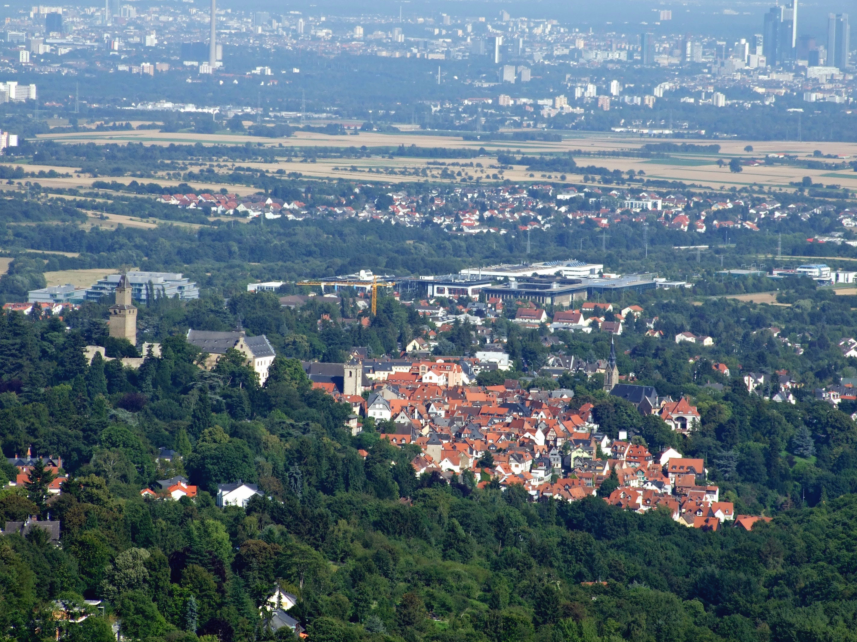 Kronberg im Taunus von Falkenstein aus (hinter dem Braun-Werksgelände und der S-Bahngleise ist Niederhöchstadt zu sehen)